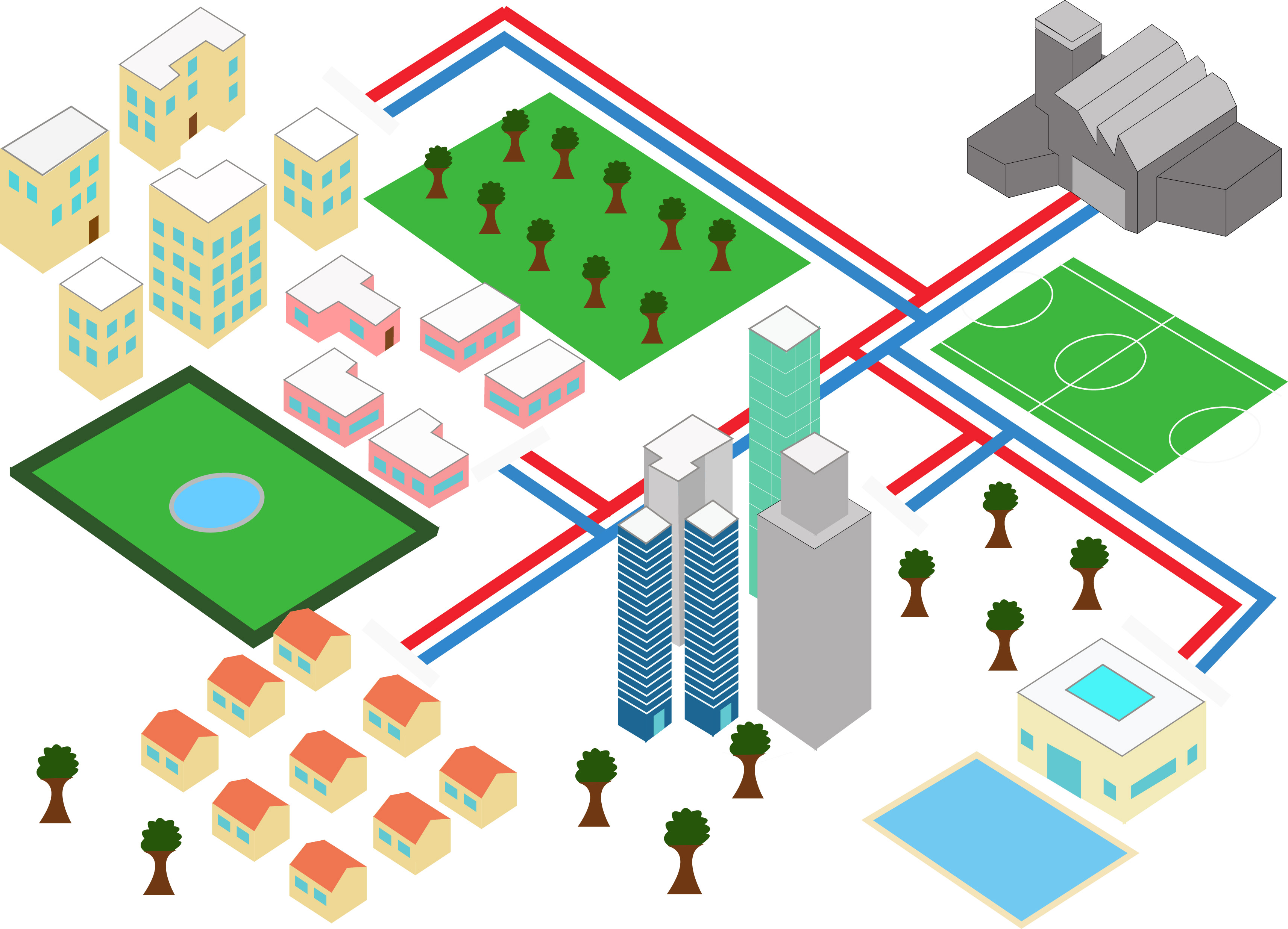 Représentation d'un réseau de chauffage urbain